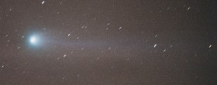 comète Hyakutake ( vue depuis le nord de la Moselle : France ) prise de vue date et heure de la photo non notée Boitier reflex Focale 135mm temps de pose environ 20 s film 1000 ASA